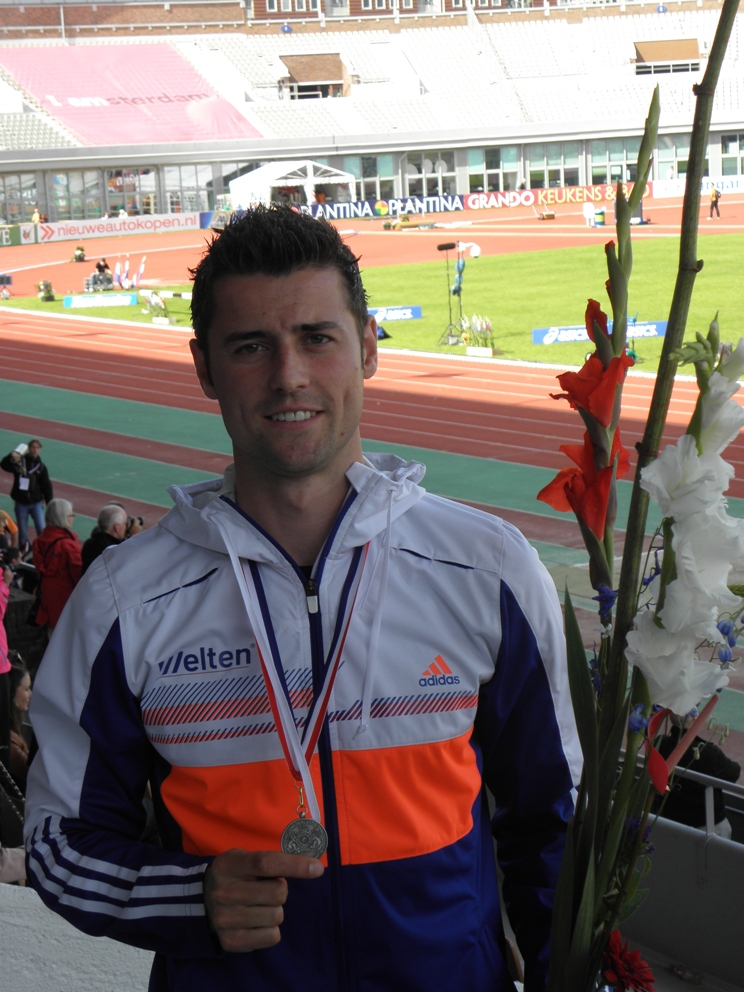 Jesper Arts loopt een nieuw persoonlijk record van 51.29 seconden en wint de zilveren medaille op het onderdeel 400 meter horden tijdens het Nederlands Kampioenschap baanatletiek dat gehouden werd in Amsterdam op 17 juni 2012.